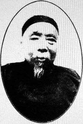 魏家骅（1863—1932年），字梅荪，号贞士，又号刚长居士，江苏江宁（今南京）人，清末进士，著名慈善家。